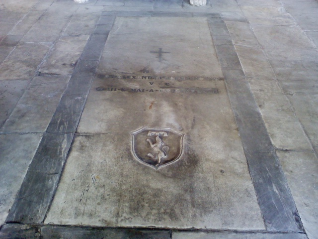 Foto personale scattata ne Camposanto Monumentale di Pisa Licensing Categoria:Tomb of Giovanni Carmignani